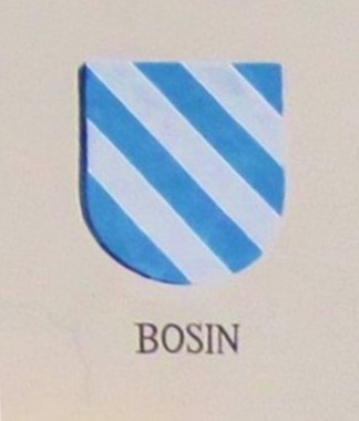 Cognomi storici dei Vicini che discendono dalle famiglie della Regola che abitavano a Predazzo e riguardano 19 cognomi: Boninsegna, Bonora, Bosin, Brigadoi, Defrancesco, Degaudenz, Dellagiacoma, Dellantonio, Dellasega, Demartin, Dezulian, Felicetti, Gabrielli, Giacomelli, Guadagnini, Morandini, Nicolao, Piazzi e Zanna.